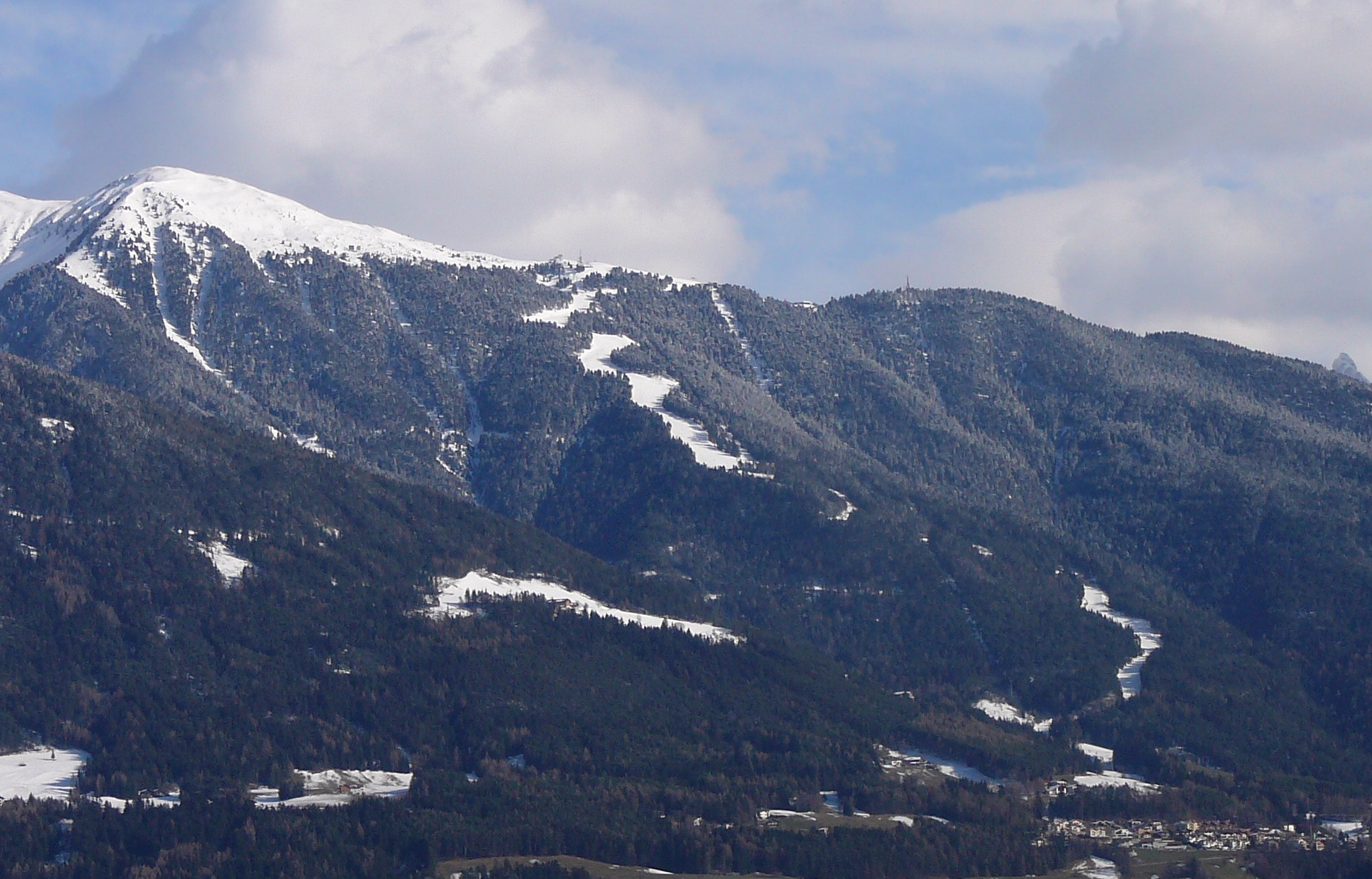 la plose e la trametsch